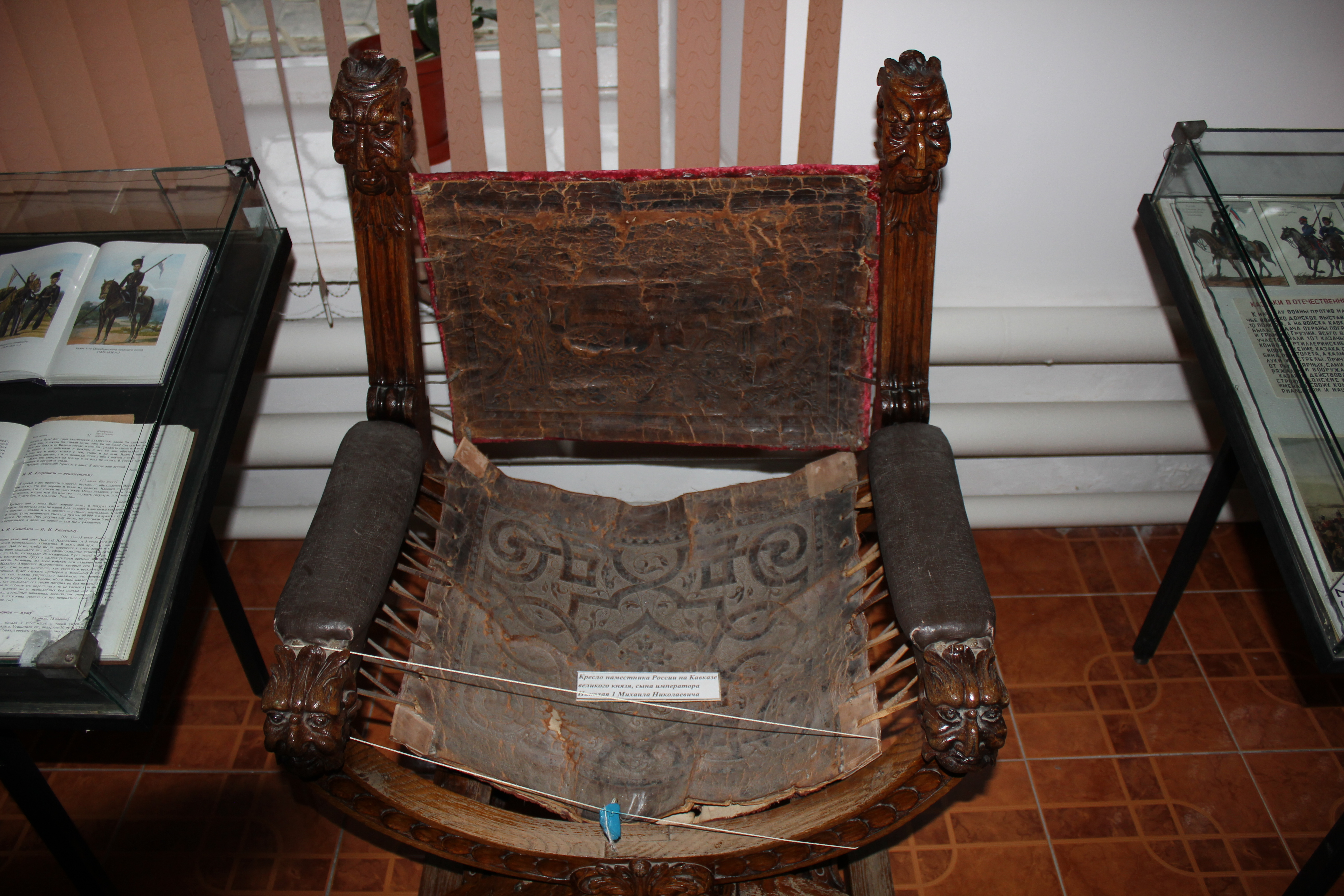 Кресло наместника России на Кавказе великого князя, сына Императора Николая Первого Михаила Николаевича. Хранится в Краеведческом музее им. Багратиона в г. Кизляр